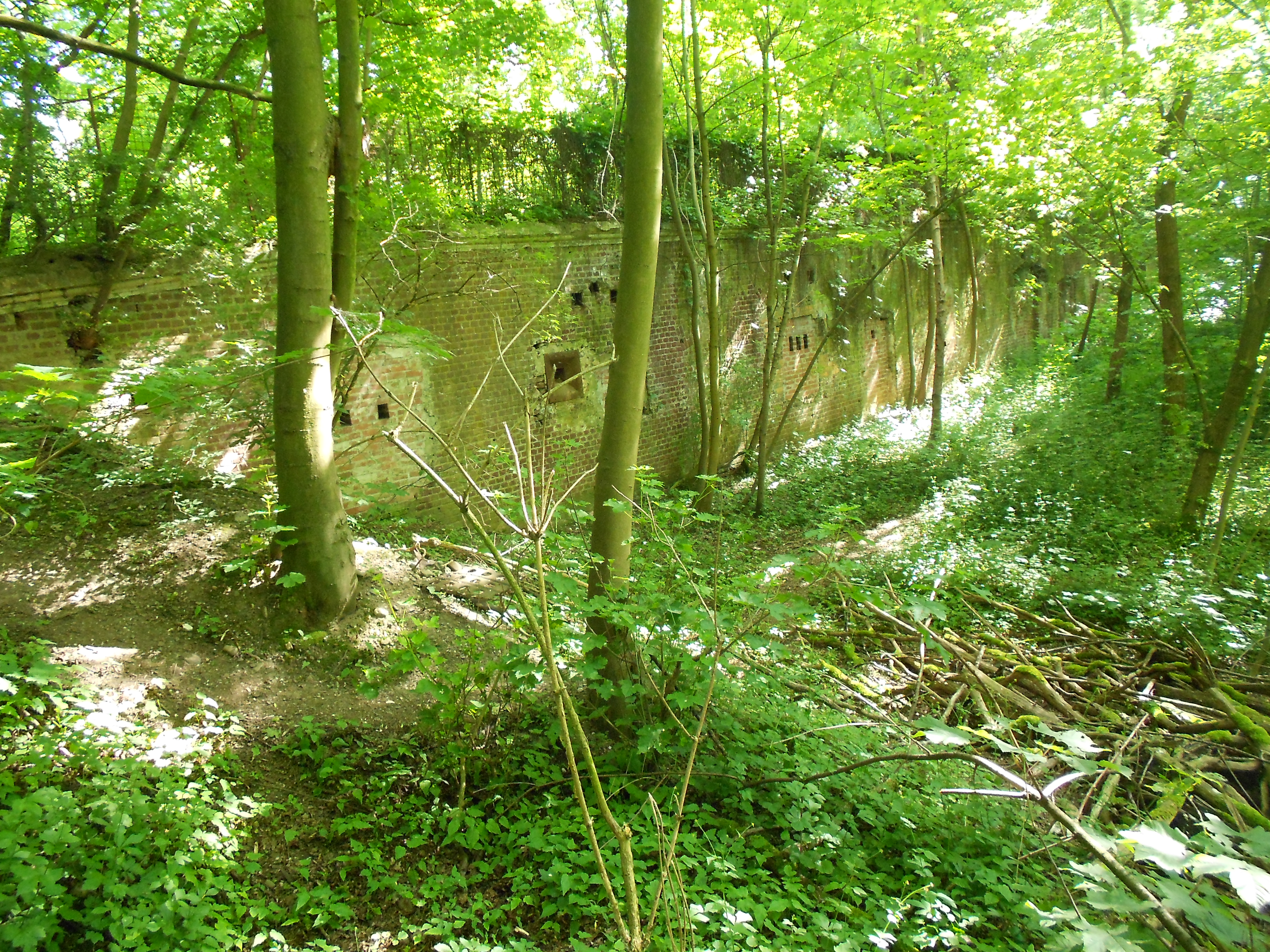 Dieses Bild zeigt die in Nord-West-Richtung zeigende Fassade des verblombten, ehemaligen Zwischenwerks IXa des Kölner Verteidigungsring aus dem Jahr 1877-1888.